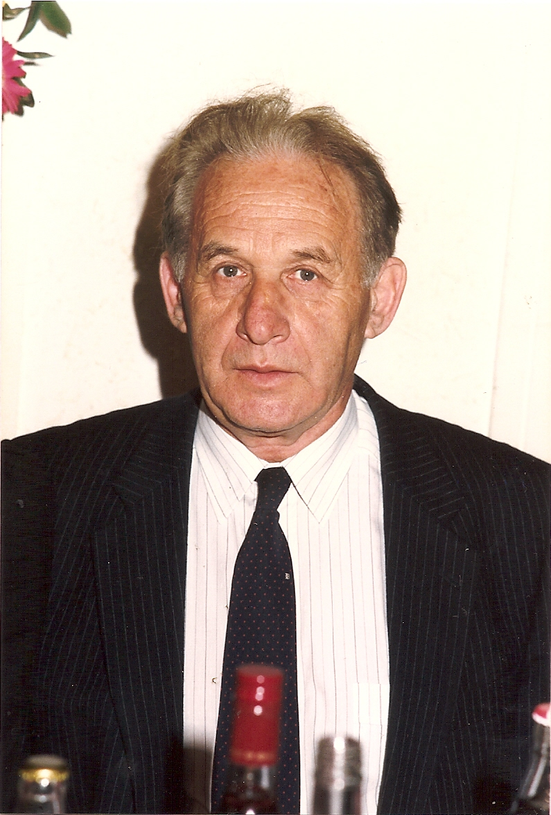 יוסף נאור היה אלוף משנה בחיל האוויר הישראלי, ממפתחי תחום הלוחמה האלקטרונית והמכ"ם בחיל, מחתני פרס ביטחון ישראל ).